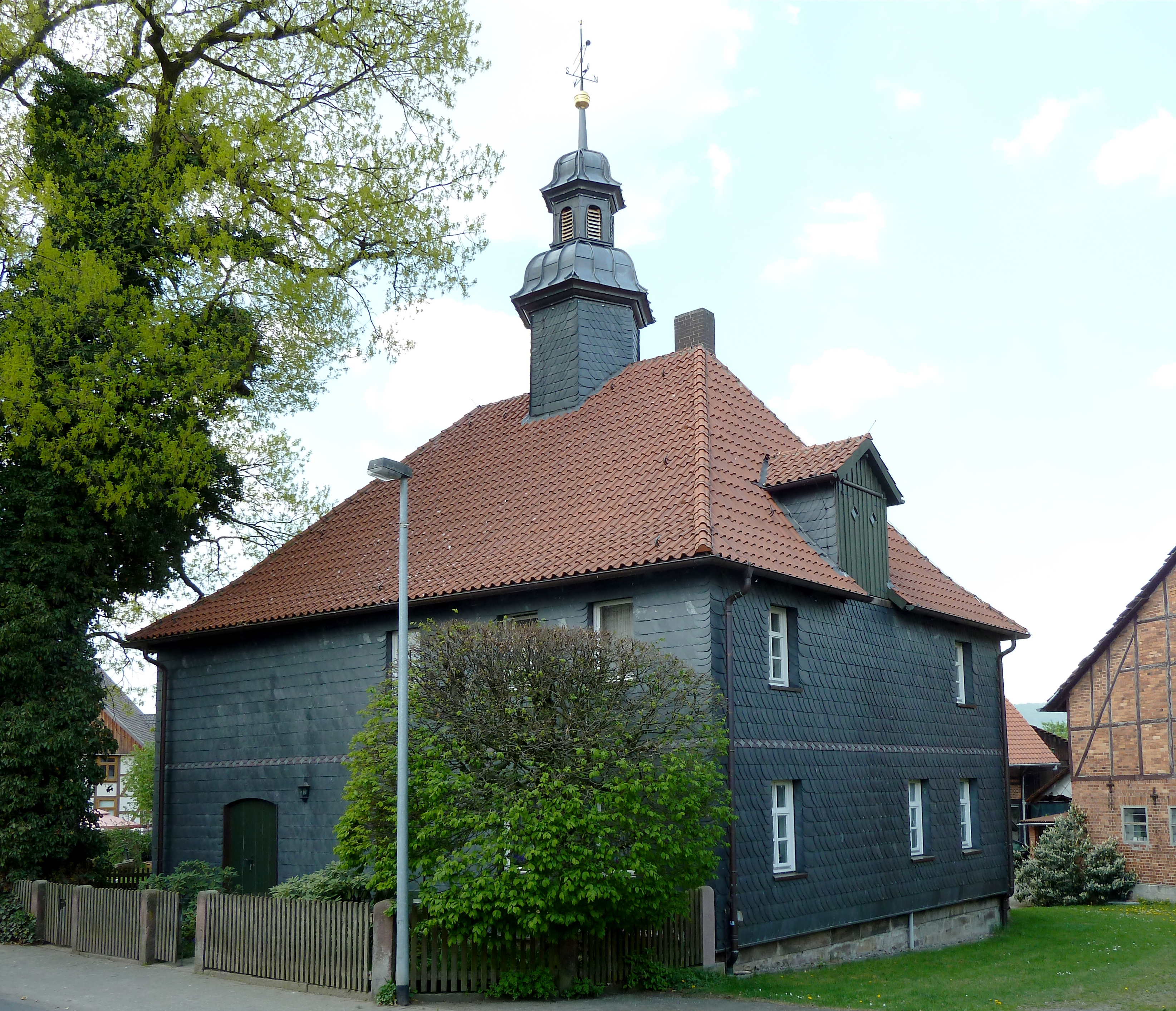 Ev.-luth. Kapelle (hinterer Gebäudeteil, links) und ehemalige Schule mit Lehrerwohnung (vorderer Gebäudeteil, rechts) in Vahle, Stadt Uslar, Niedersachsen. Schmuckloses Fachwerkkapelle mit Behang, erbaut 1792